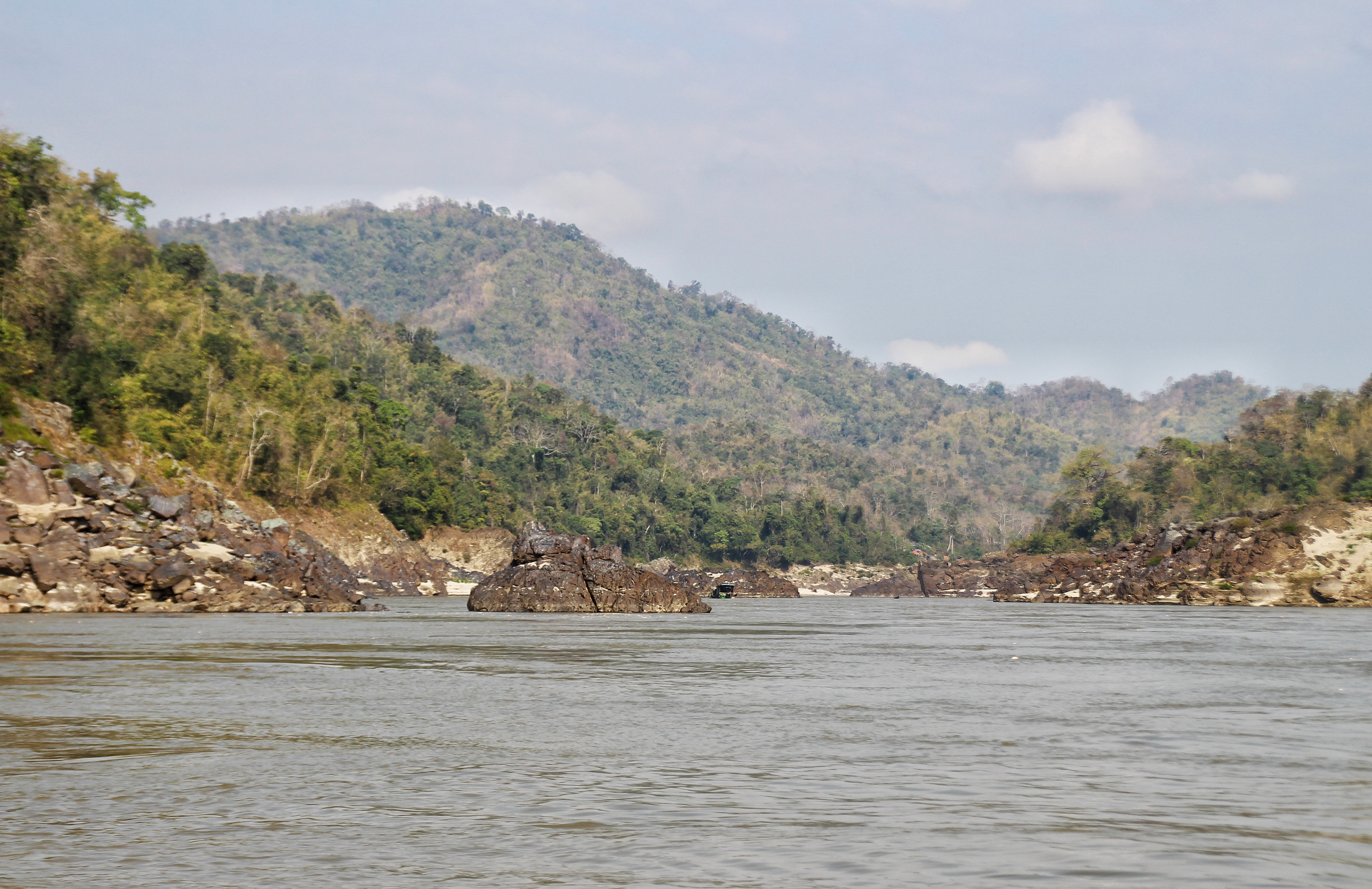 ဧရာဝတီမြစ်၏ ပထမဆုံးမြစ်ကျဉ်းတစ်နေရာ